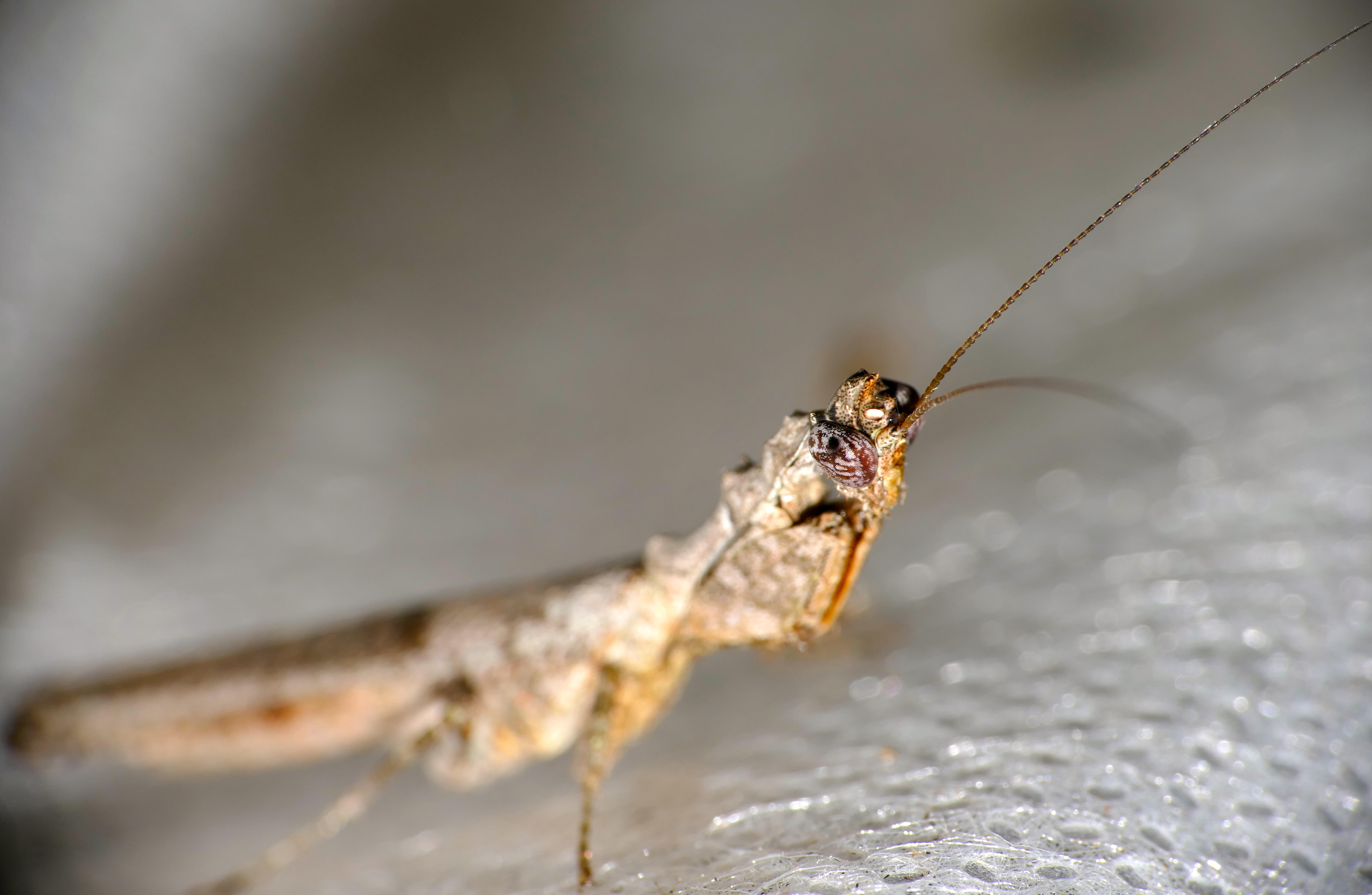 Letaba Camp, Kruger NP, SOUTH AFRICA